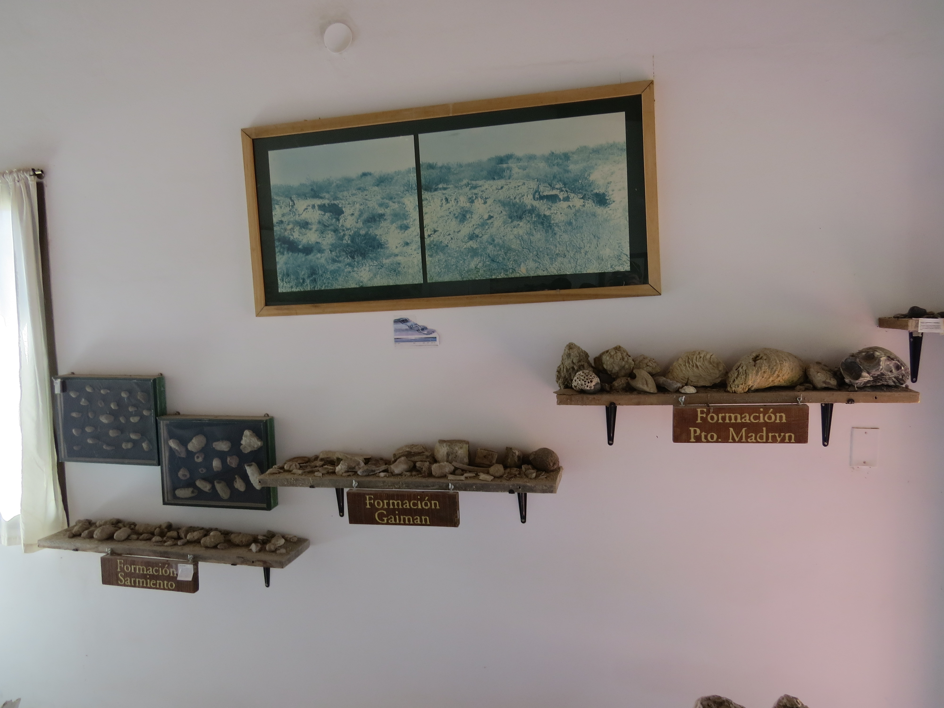 Estacion Bryn Gwyn